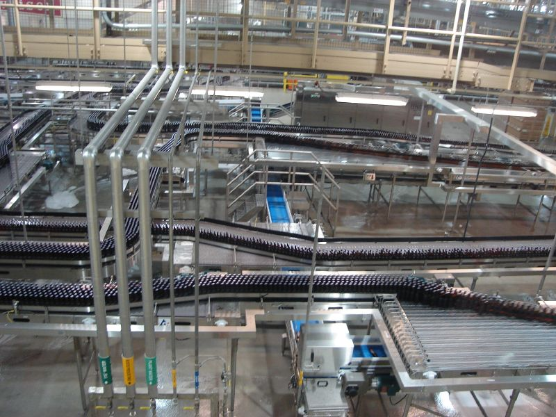 Budweiser Plant